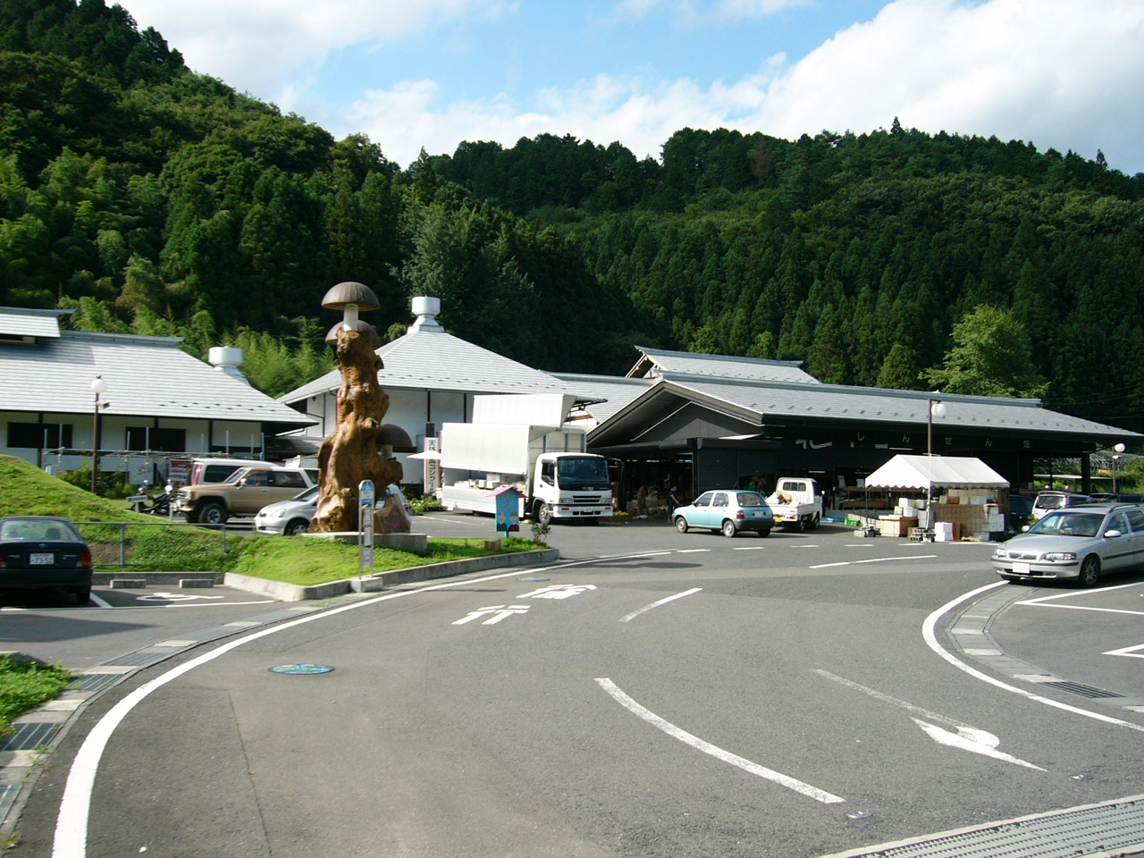 Michinoeki Miwa (Ibaraki) (道の駅みわ)